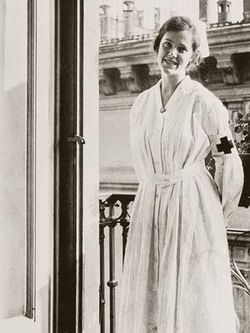 Agnes von Kurowsky in Milan